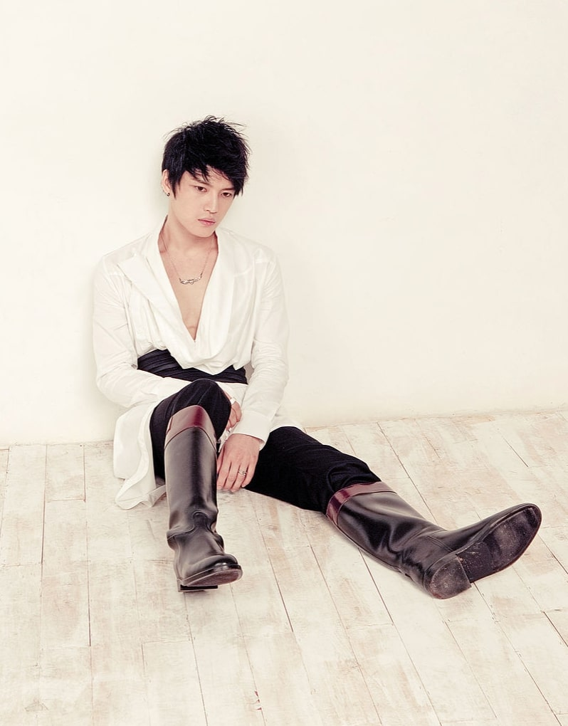 LG 옵티머스 Q2 광고 사진 - JYJ